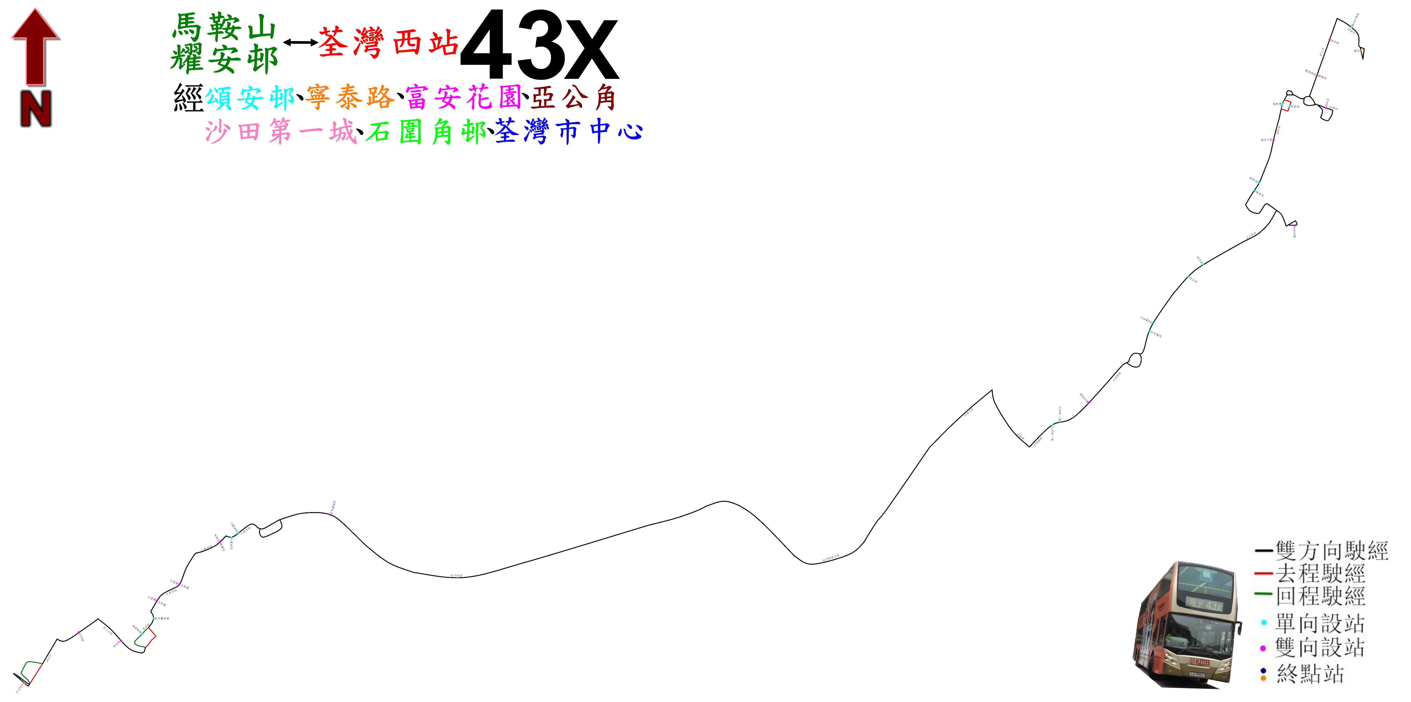 中文（香港）: 九巴43X線的走線圖